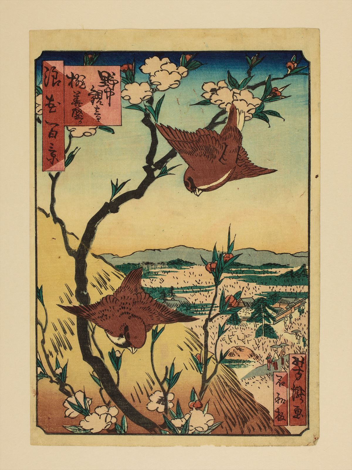 1800年代。里の家芳瀧/画。浪花百景 102枚のうちの1枚。大阪市立中央図書館蔵。